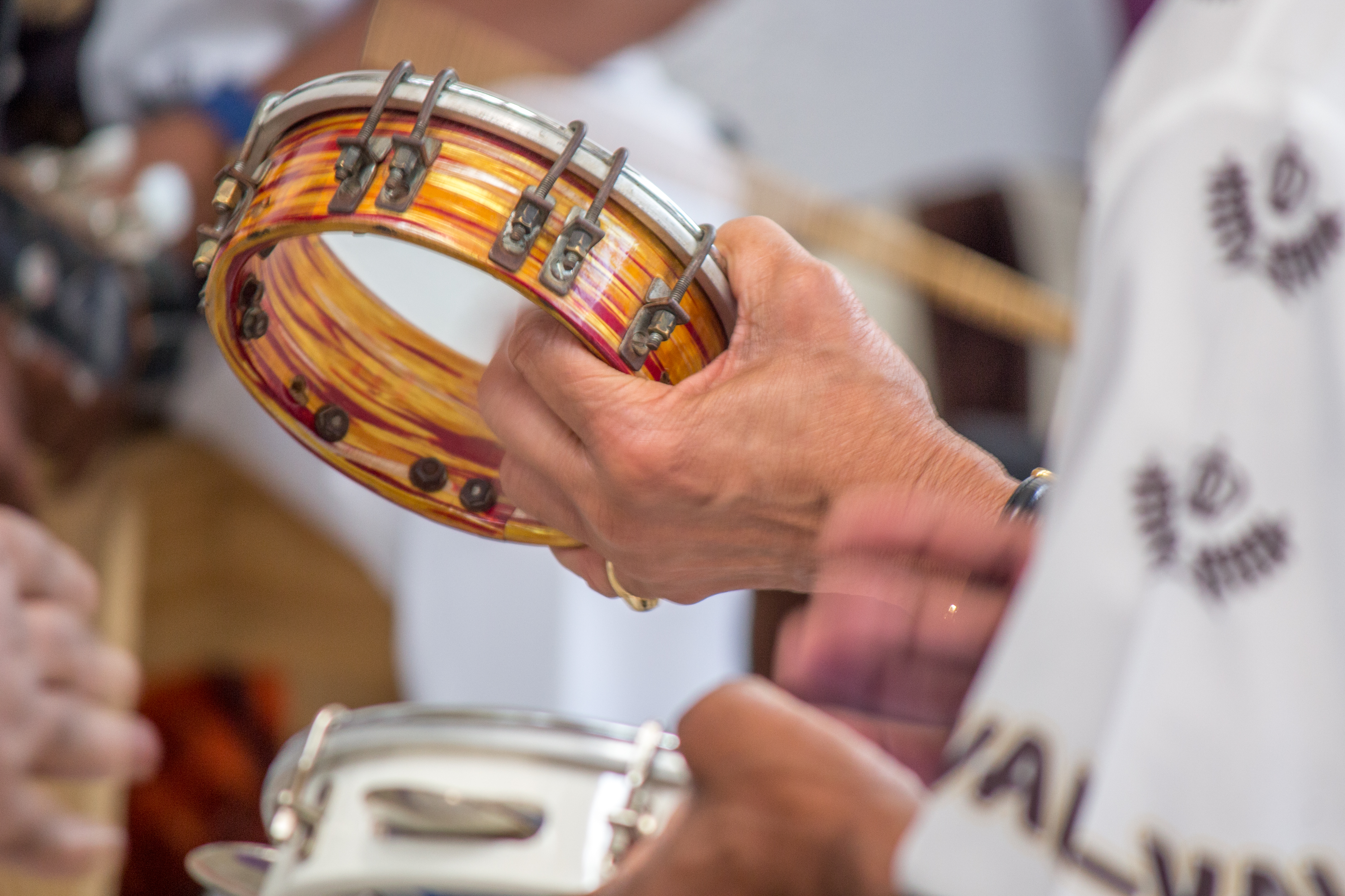 Tamborim tocado em uma roda de samba